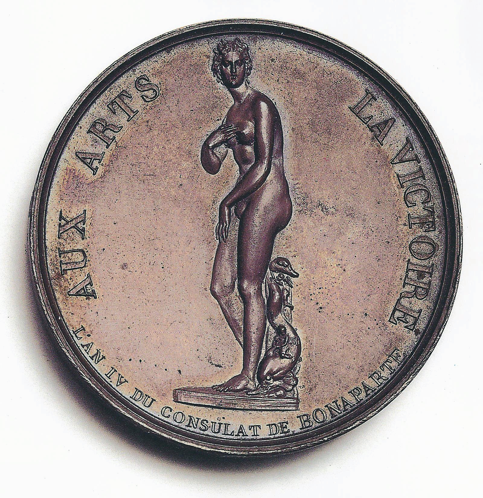 franz. Bronzemedaille, Rückseite, geprägt 1803 in der "Monnaie de Paris" unter der Regie von Vivant Denon